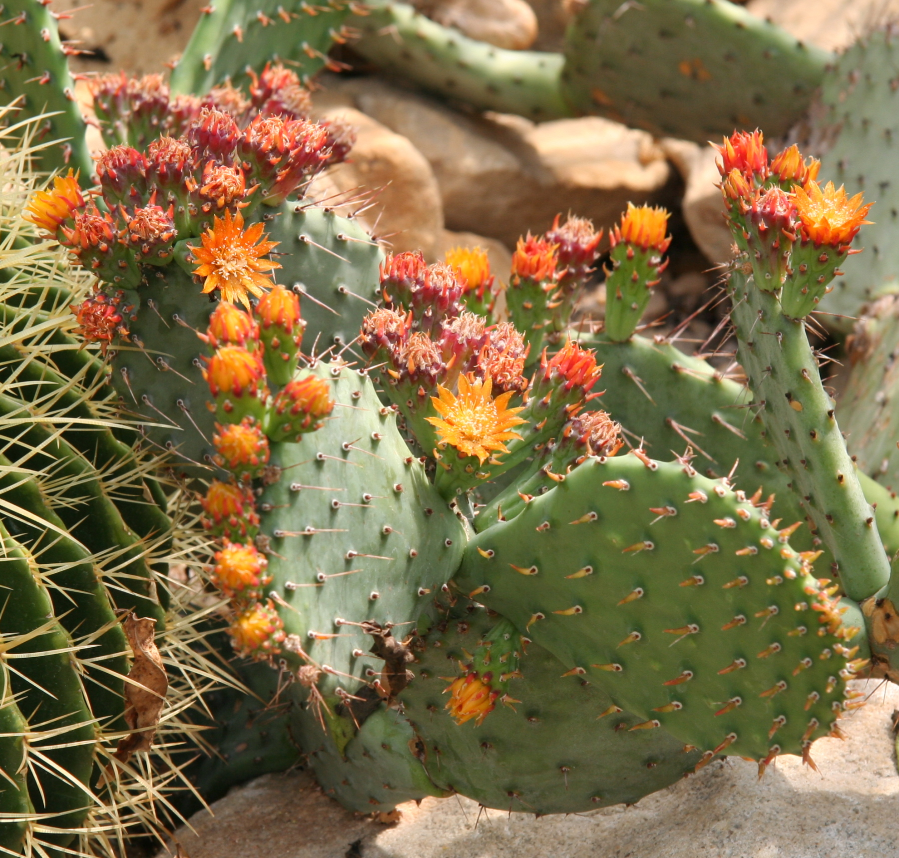 Opuntia stenopetala im Botanischen Garten Dresden